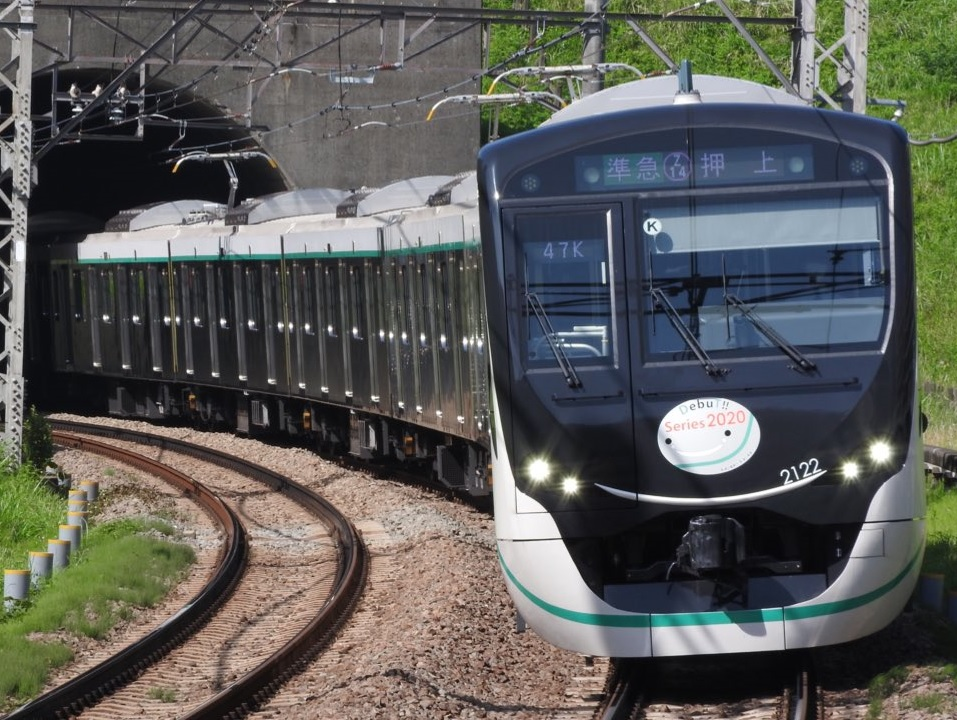 東急2000系2122編成。たまプラーザ駅。